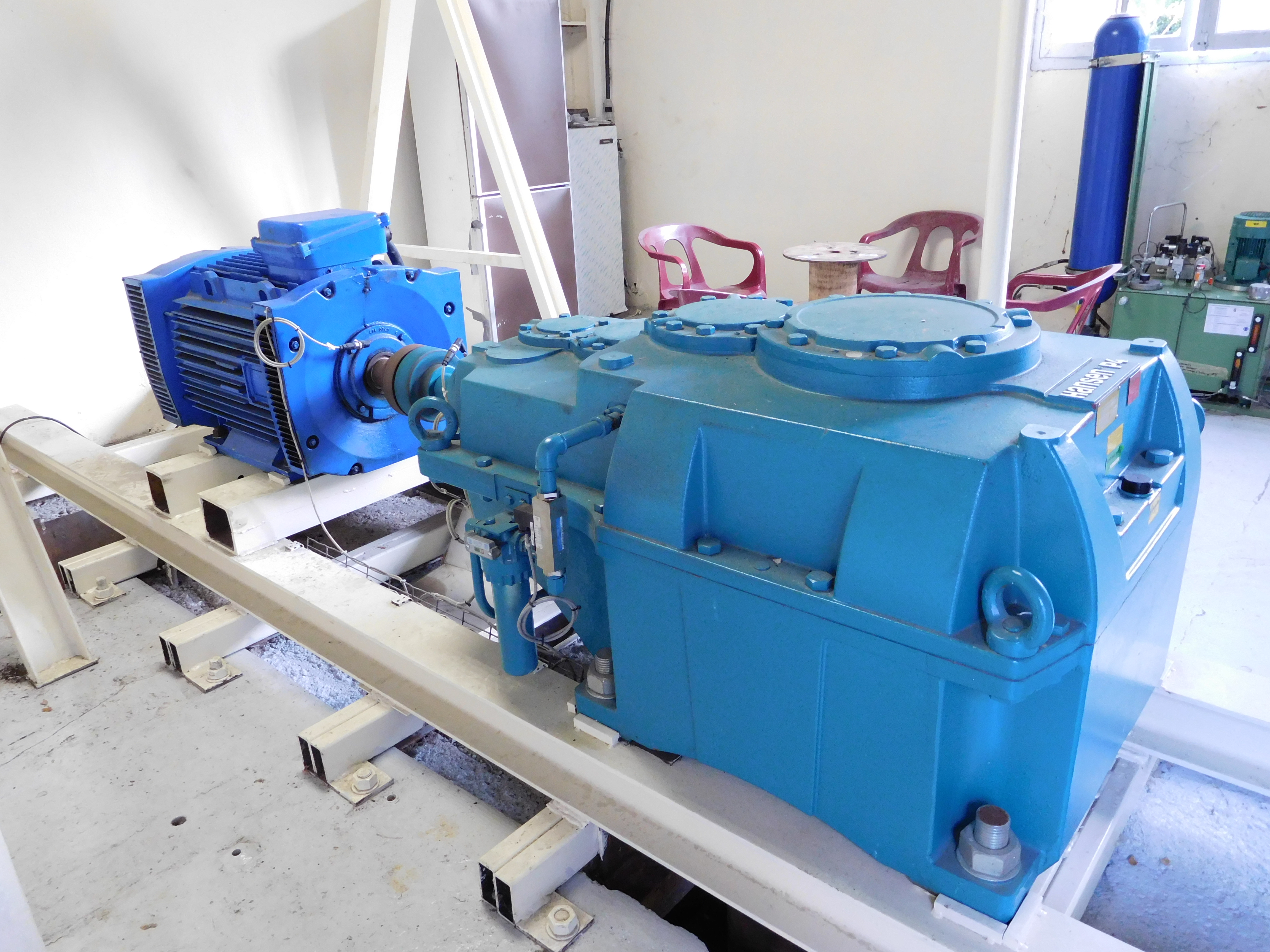 Transmission (multiplicateur) à angle droit Hansen P4, au-dessus de la turbine Fontaine, et générateur électrique (à gauche), à la micro-centrale hydroélectrique sur la rivière Isle à Gabillou, près de Mussidan (Dordogne, France).